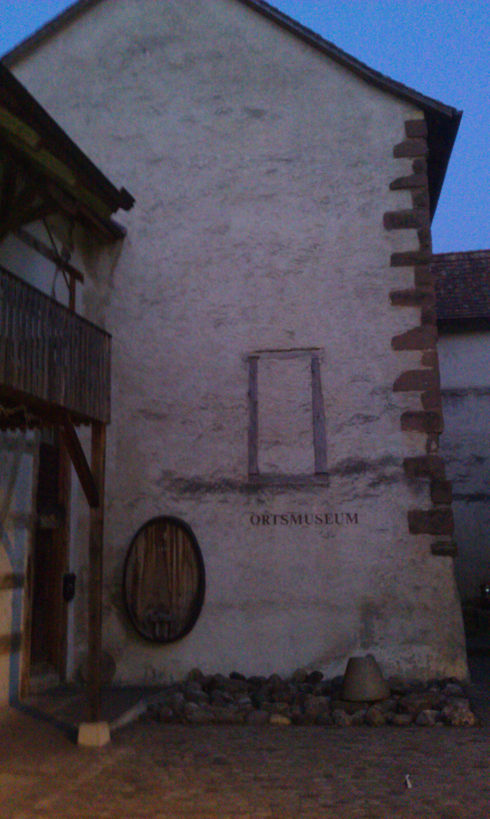 Ortsmuseum Beringen am Abend